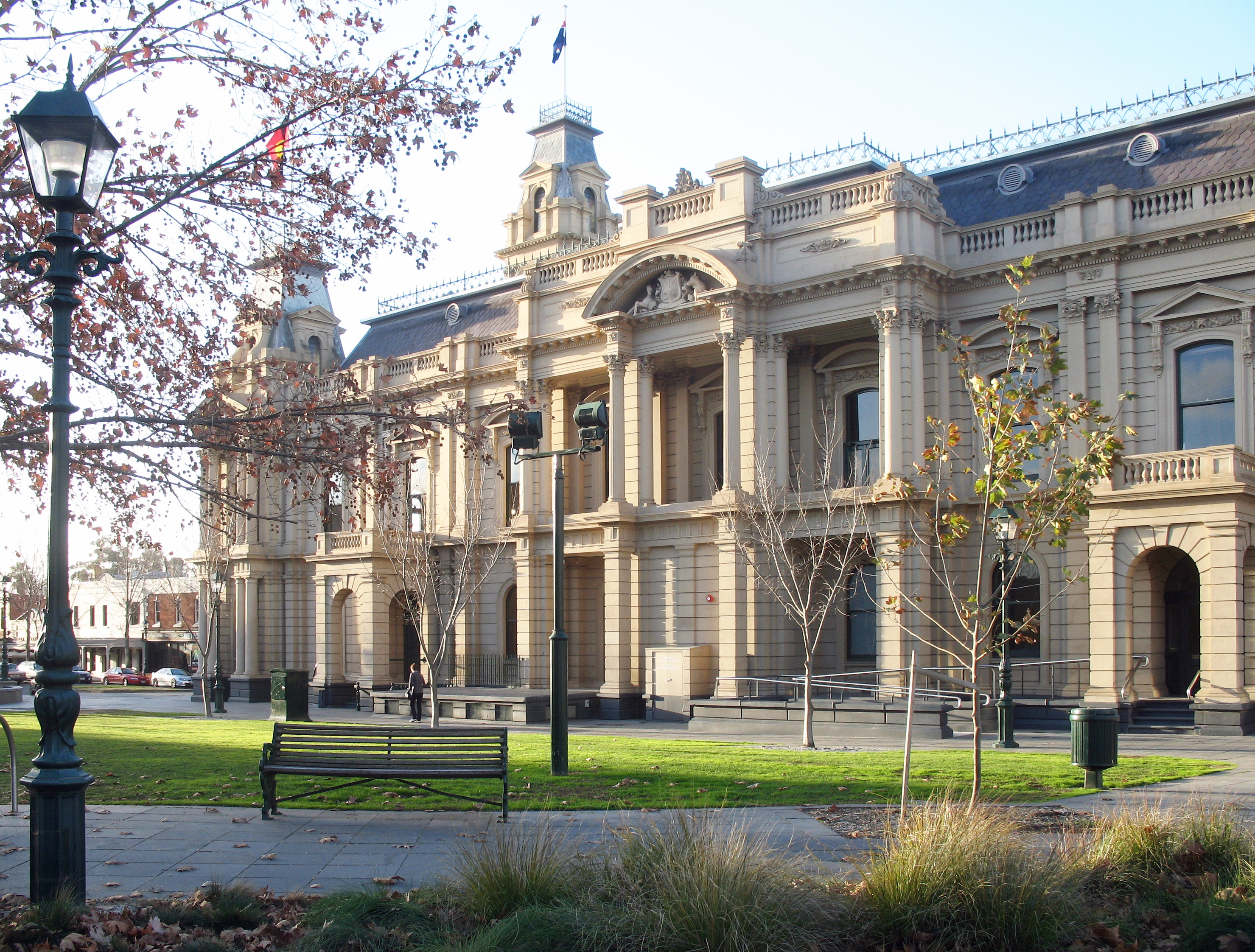 Bendigo, l'hôtel de ville (vue sur le côté)